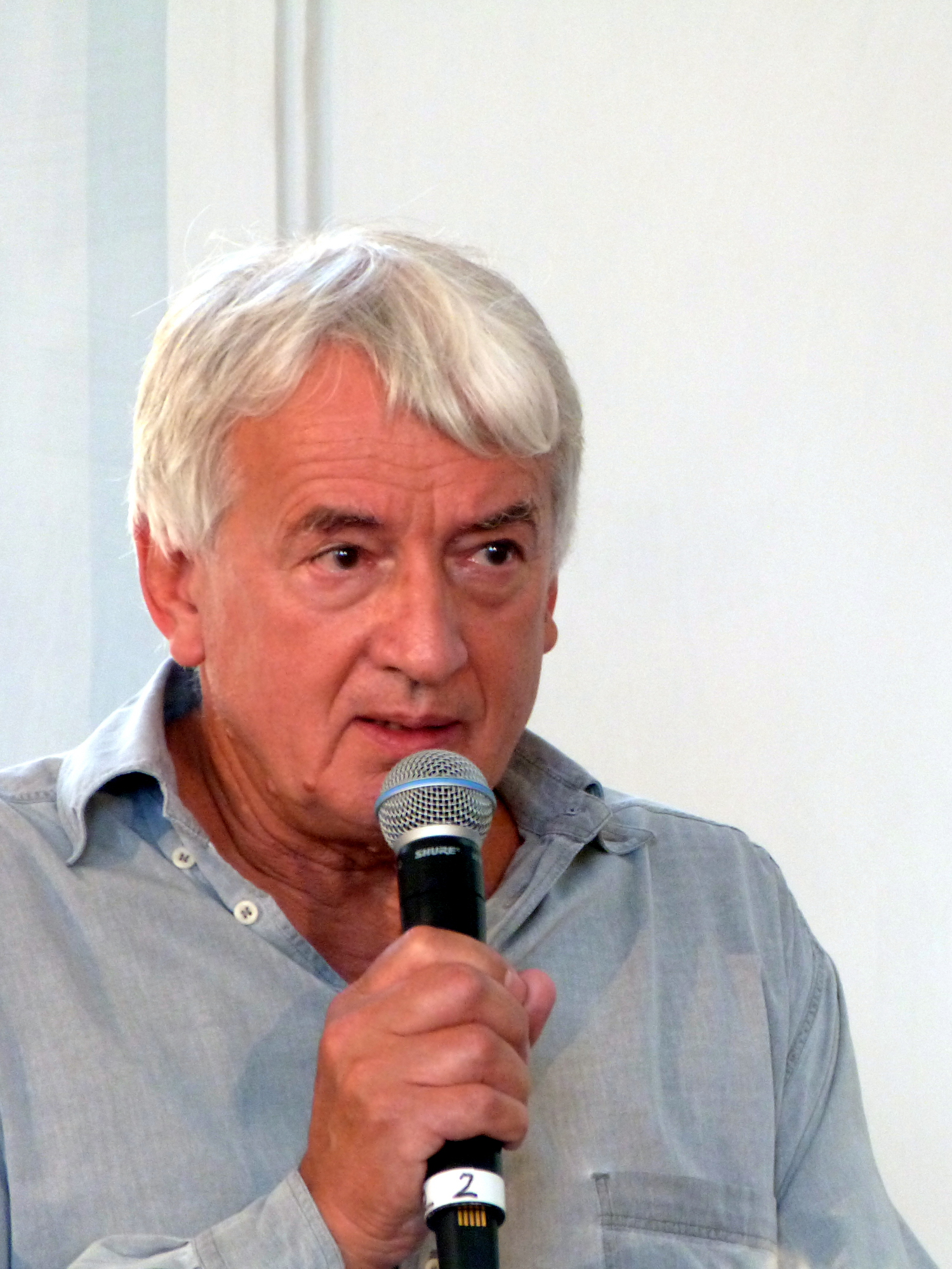 Der Lehrer und Mobbing-Experte Wolfgang Kindler bei einer Podiumsdiskussion auf dem Erlanger Poetenfest 2016.